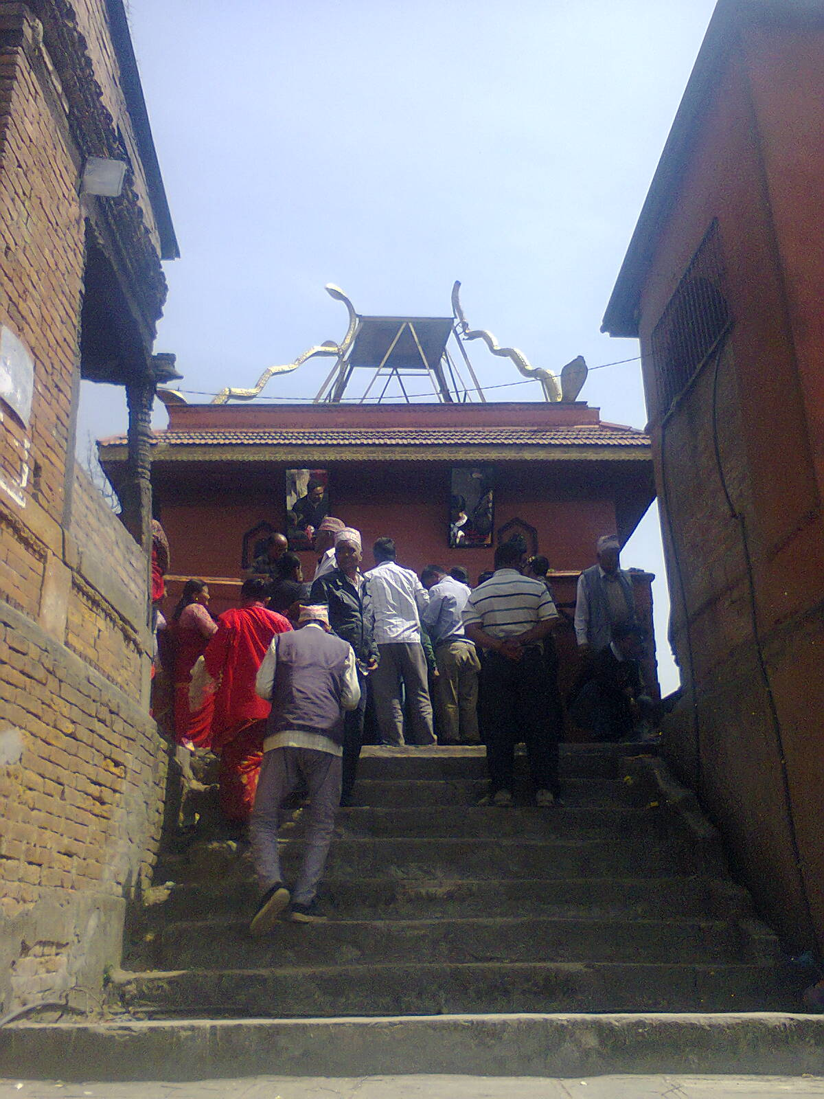 नेपाली: नीलबाराही मन्दिर